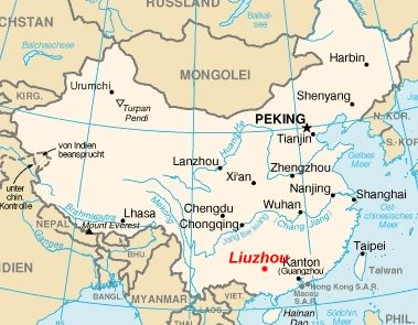 Lage der Stadt Liuzhou